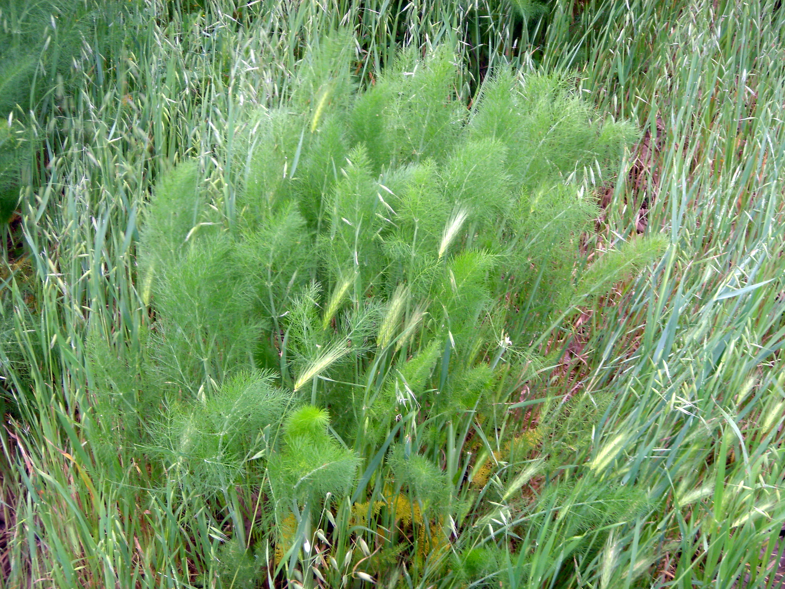 A wild fennel plant.